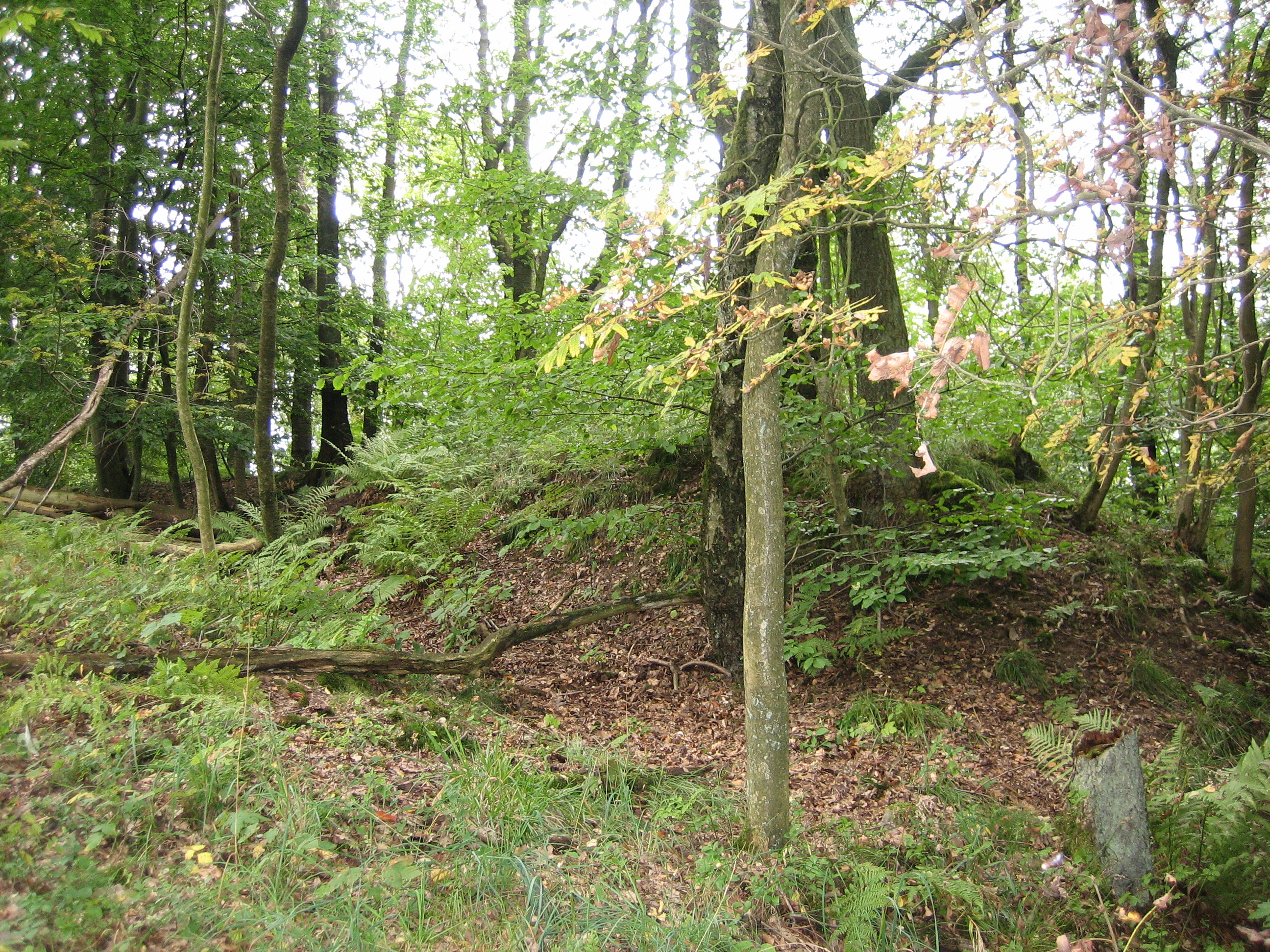 Landwehr an der Stadtgrenze Iserlohn–Altena im Bereich „Toter Mann“. Höhe heute noch bis 1,5 m (oberhalb des Hohlweges), Länge ein paar dutzend Meter.